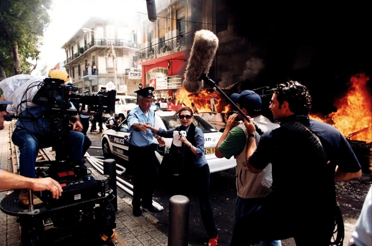 מתוך סרטו של עמוס גיתאי 11-09-01: ישראל